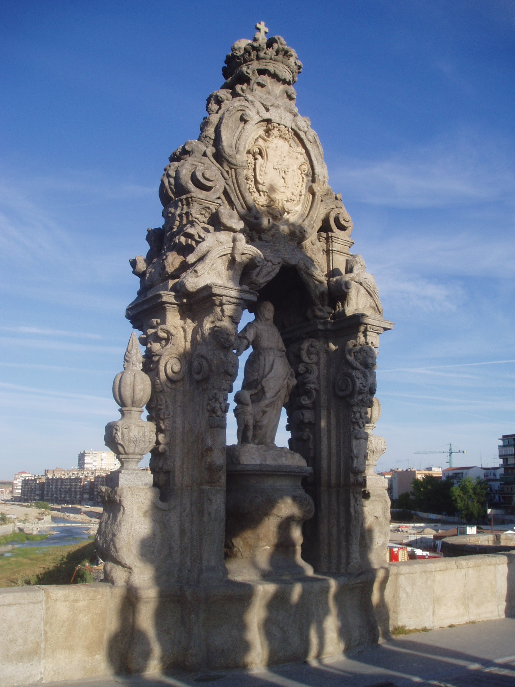 Santa María de la Cabeza. Puente de Toledo. Madrid. España